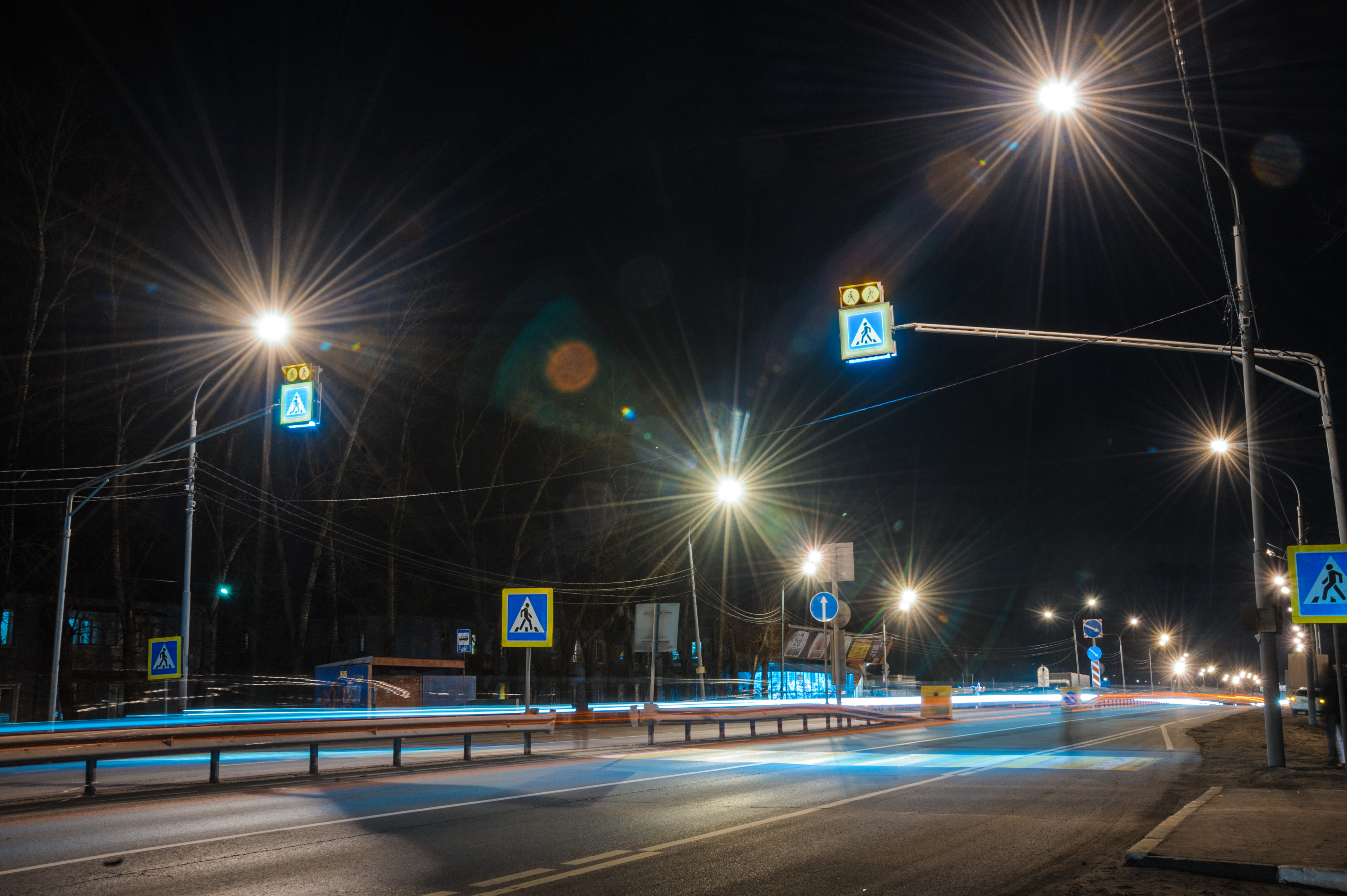 Инновационный переход на трассе Москва-Нижний Новгород